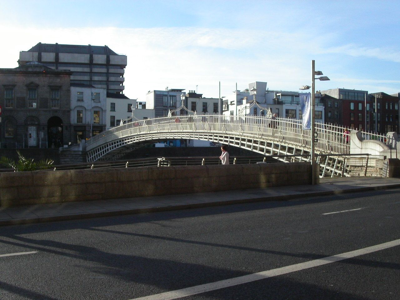 Ha'penny Bridge.